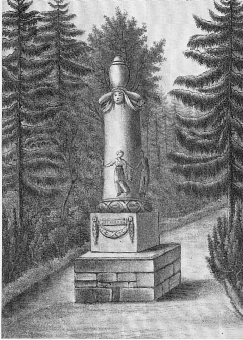 Denkmal der Christiane Becker-Neumann vom Gothauer Bildhauer Döll, Steindruck, Sammlung Kippenberg Leipzig (1932)